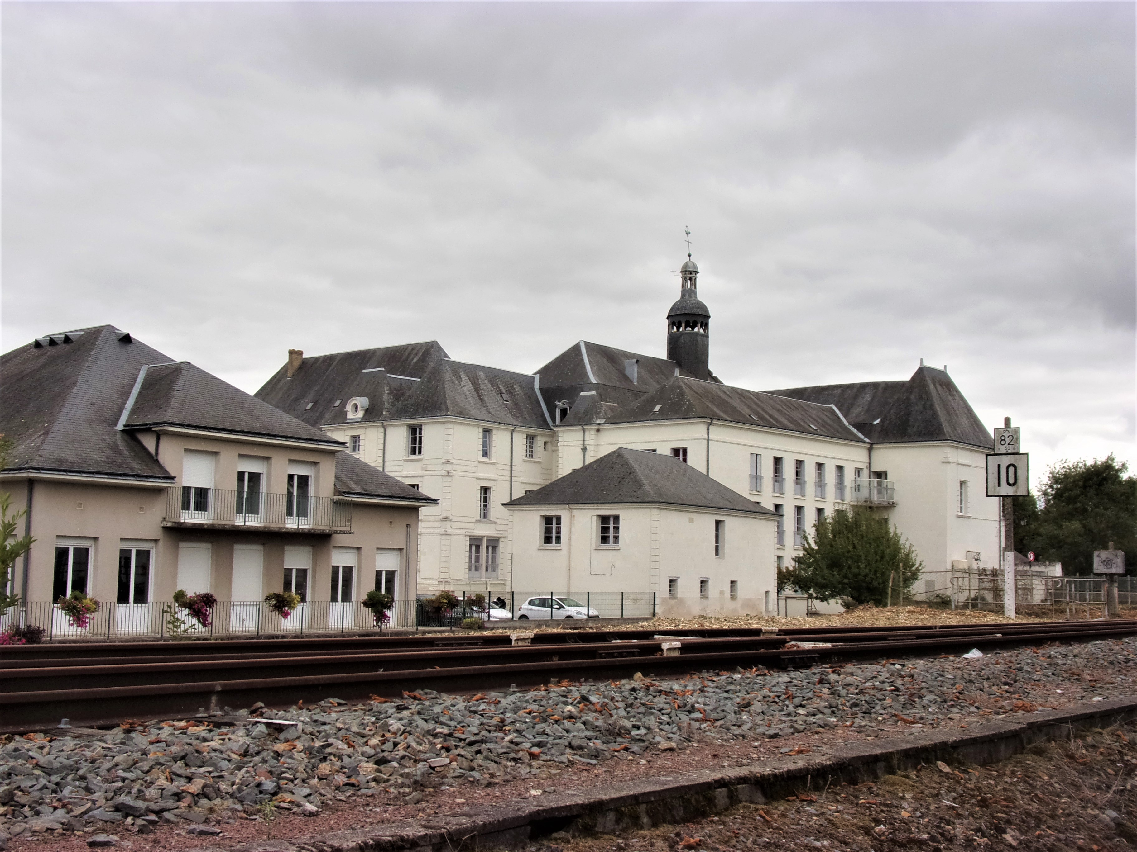 Vue générale de l'hôpital depuis les voies de chemin de fer